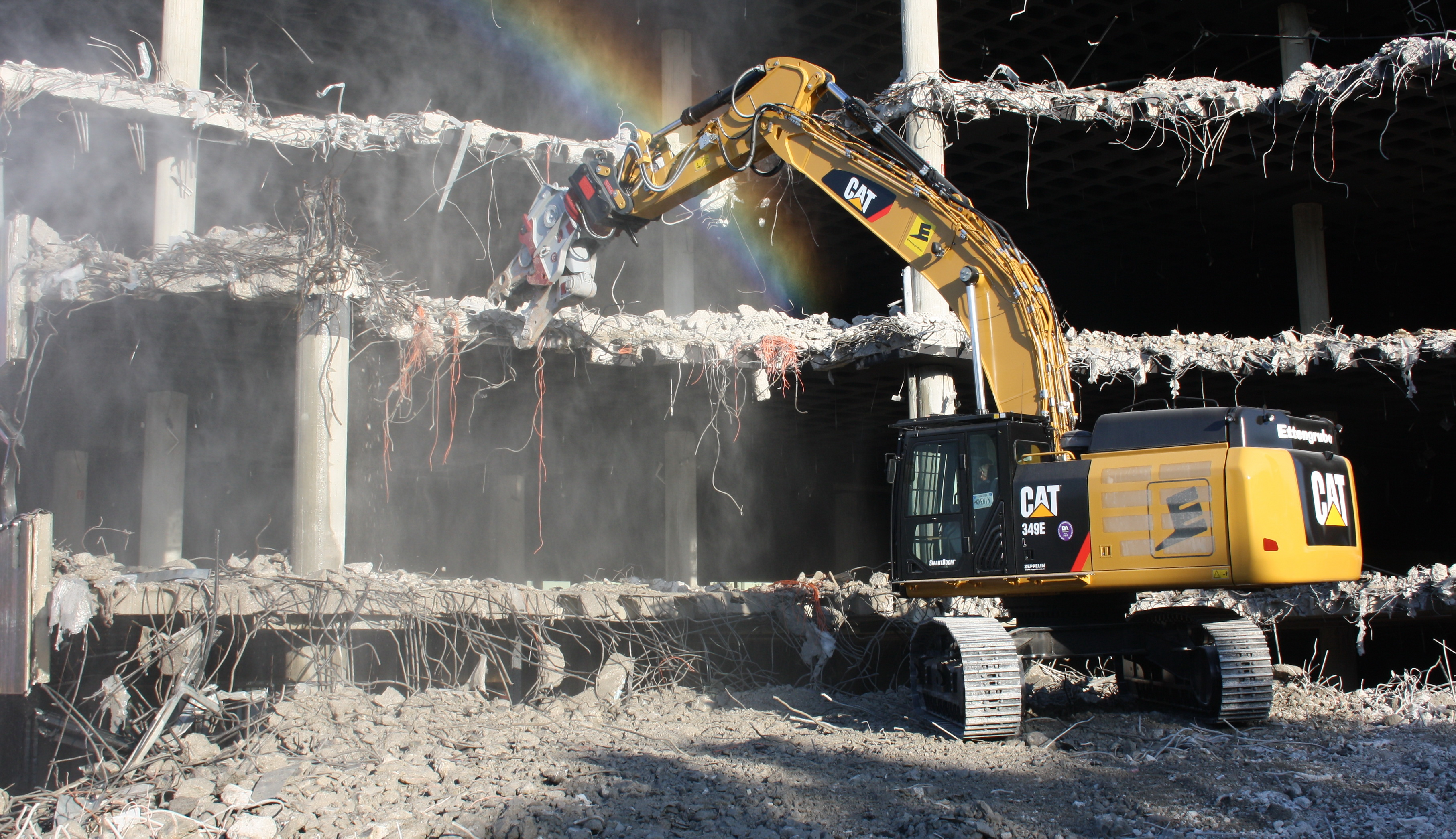 München, Am Westpark, Abriss des alten ADAC-Gebäudes. Zum Einsatz kommt ein Bagger vom Typ Caterpillar 349E.